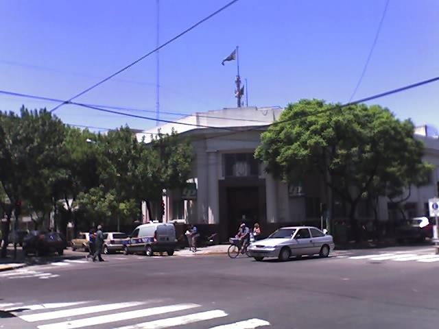 Building of Banco de la Provincia de Buenos Aires, state run bank, Merlo Partido, Buenos Aires Province, Argentina.